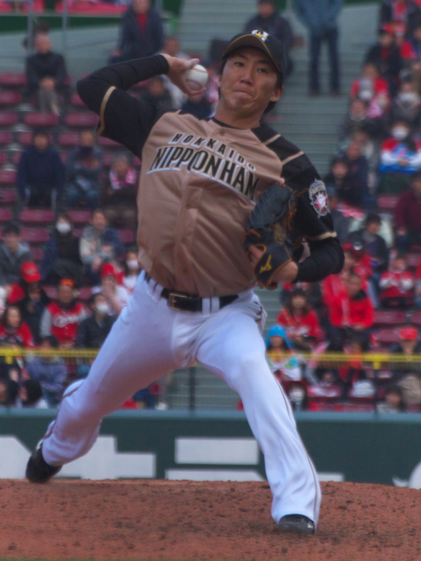 北海道日本ハムファイターズ浦野博司